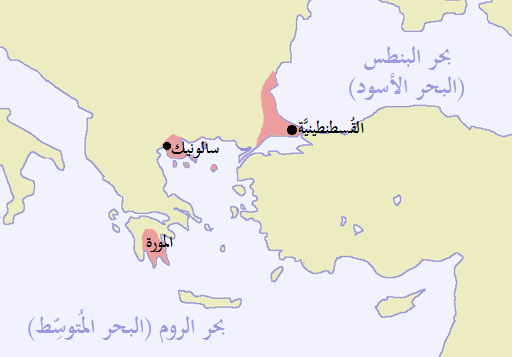 ما تبقَّى من بلادٍ خاضعةٍ لِلإمبراطوريَّة البيزنطيَّة حوالي سنة 1400م.